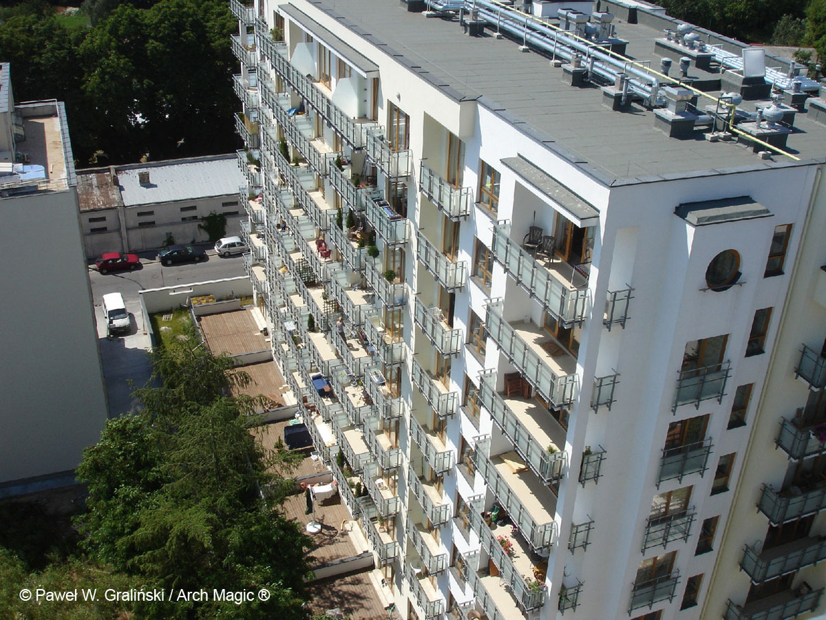 budynek Horse Race Apartaments Warszawa- Służew, ul. Wyścigowa 8B